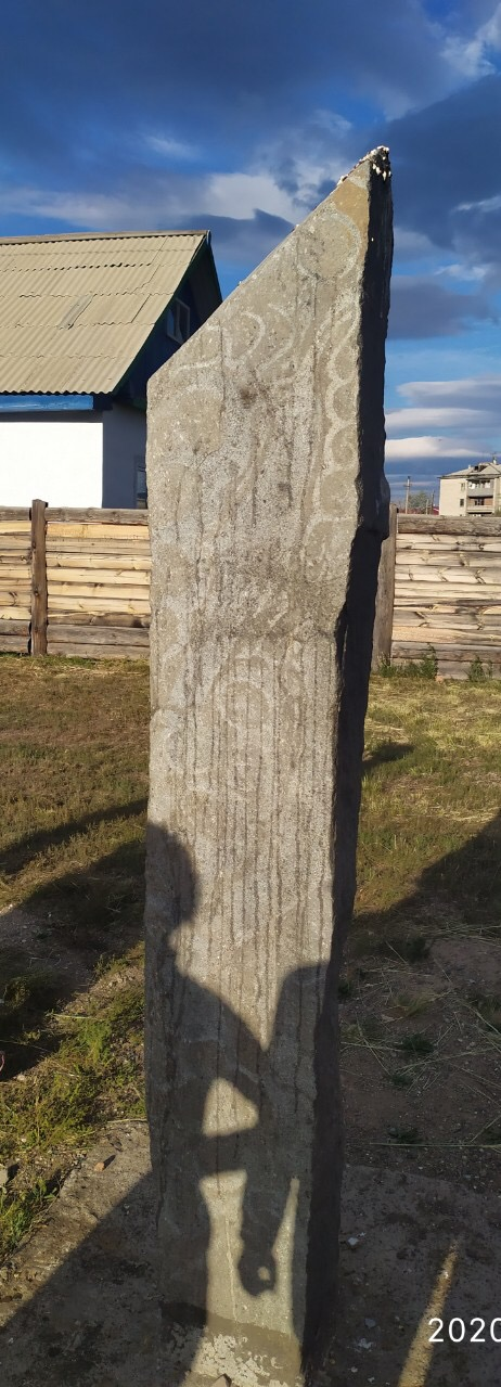 Оленный камень